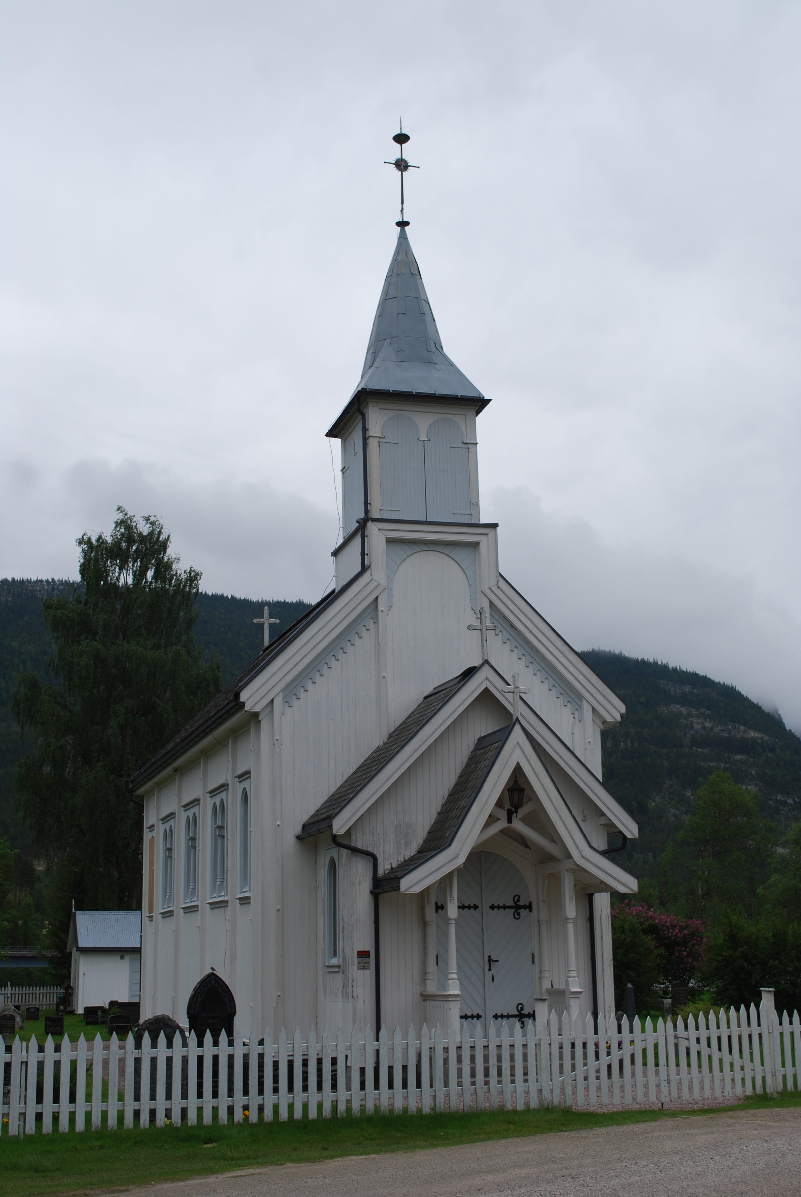 Atneosen kapell er en langkirke fra 1882 i Stor-Elvdal kommune, Hedmark fylke.